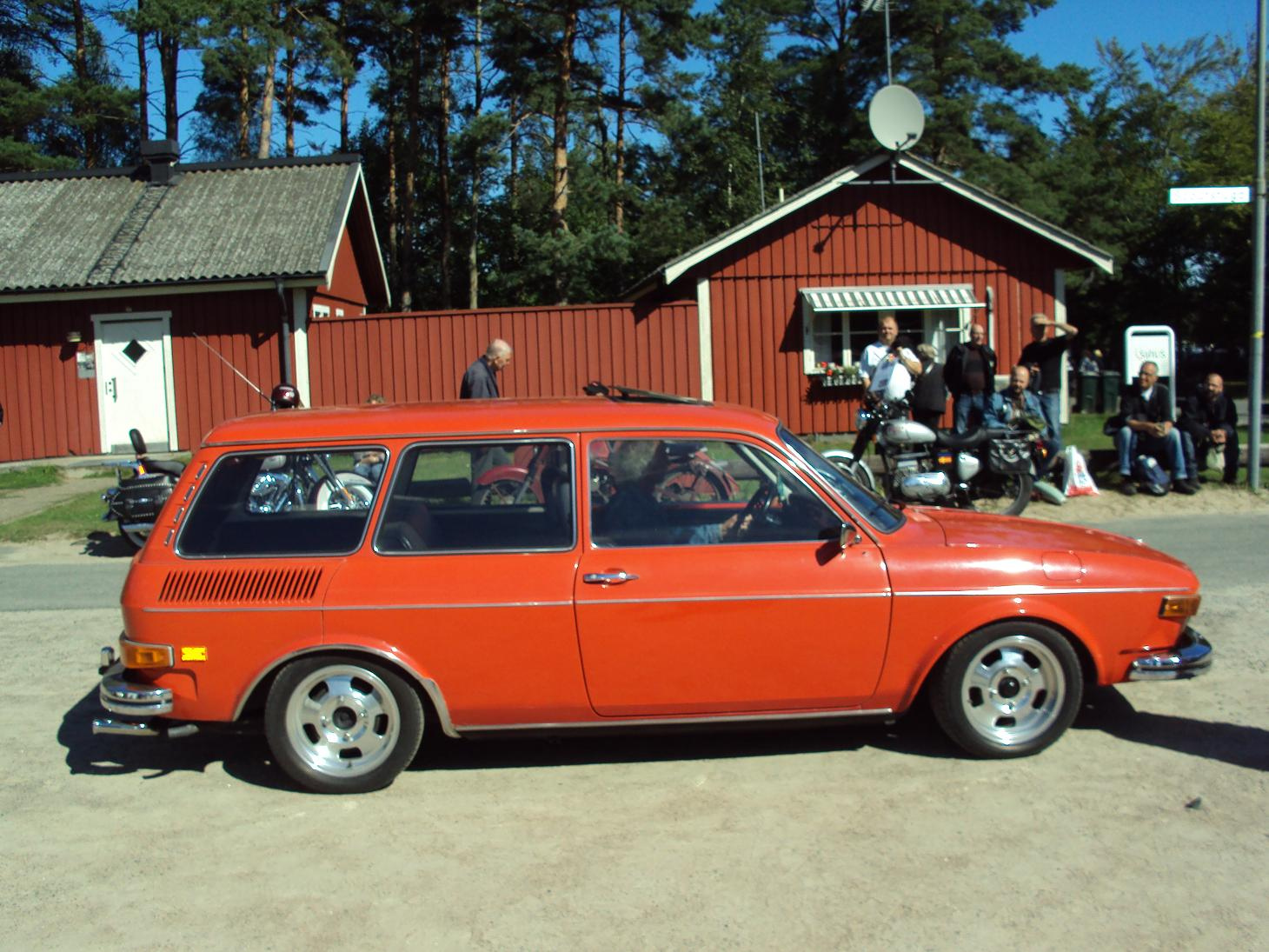 Volkswagen 412 LE Variant